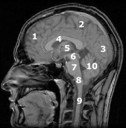 Skan MRI mózgowia człowieka (norma) w przekroju strzałkowym, ukazując przyśrodkową powierzchnię jednej z półkul.